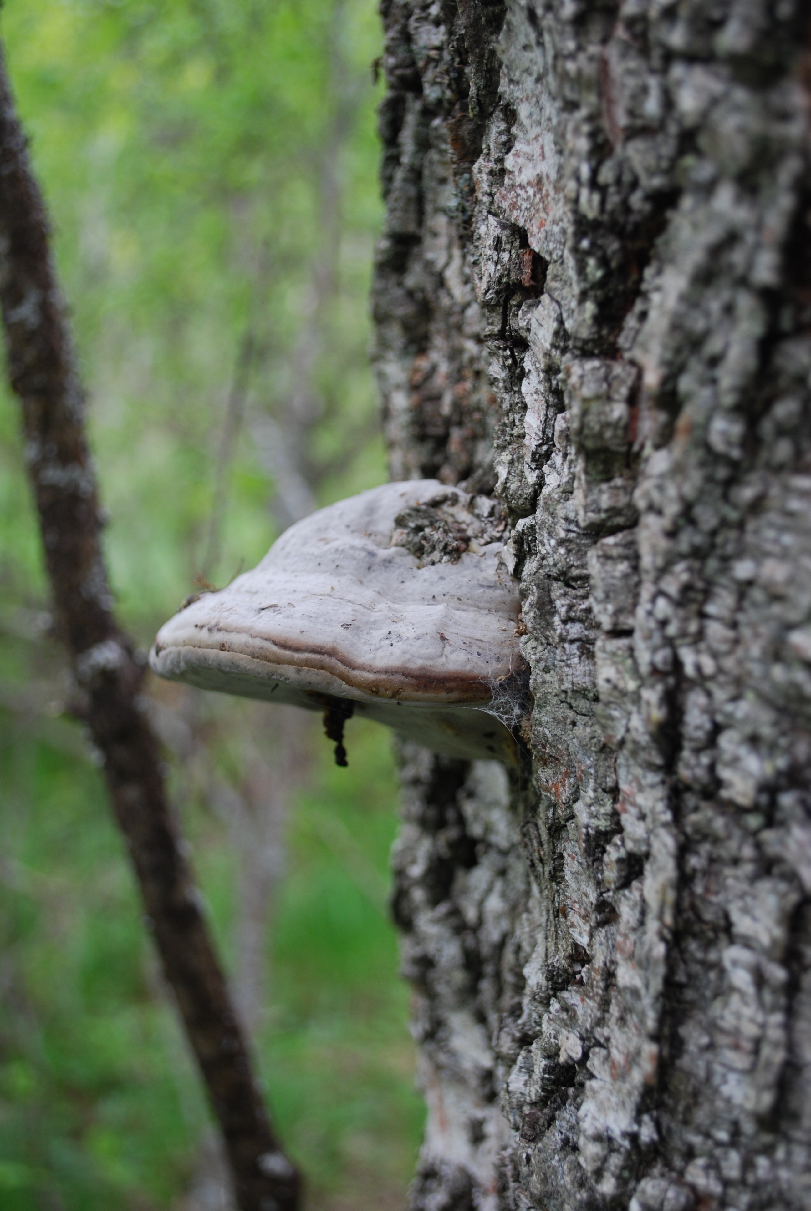 Tuletael (Fomes fomentarius) puutüvel